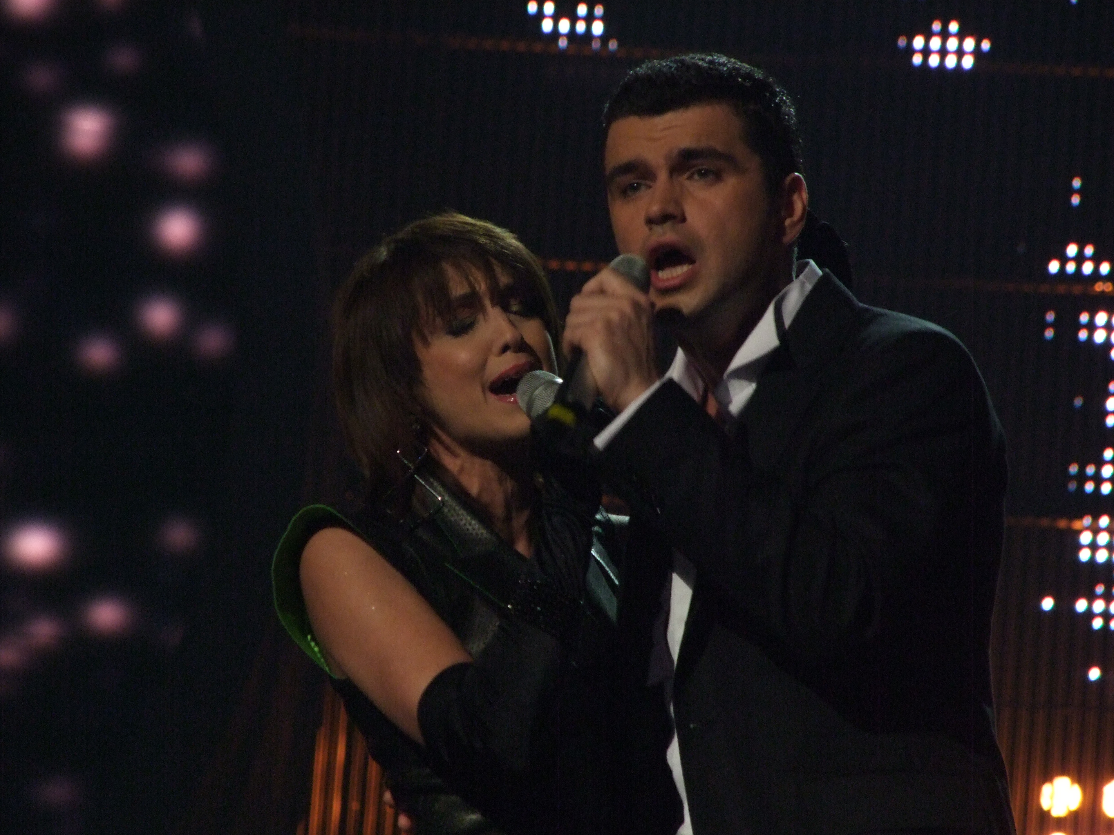 Semifinal 1 EUROVISION 2008